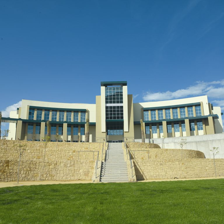 Uno de los centros de trabajo de la ciudad de la Luz visto desde los jardines, dentro se albergan salas de conferencia, camerinos, platos, talleres entre otros.